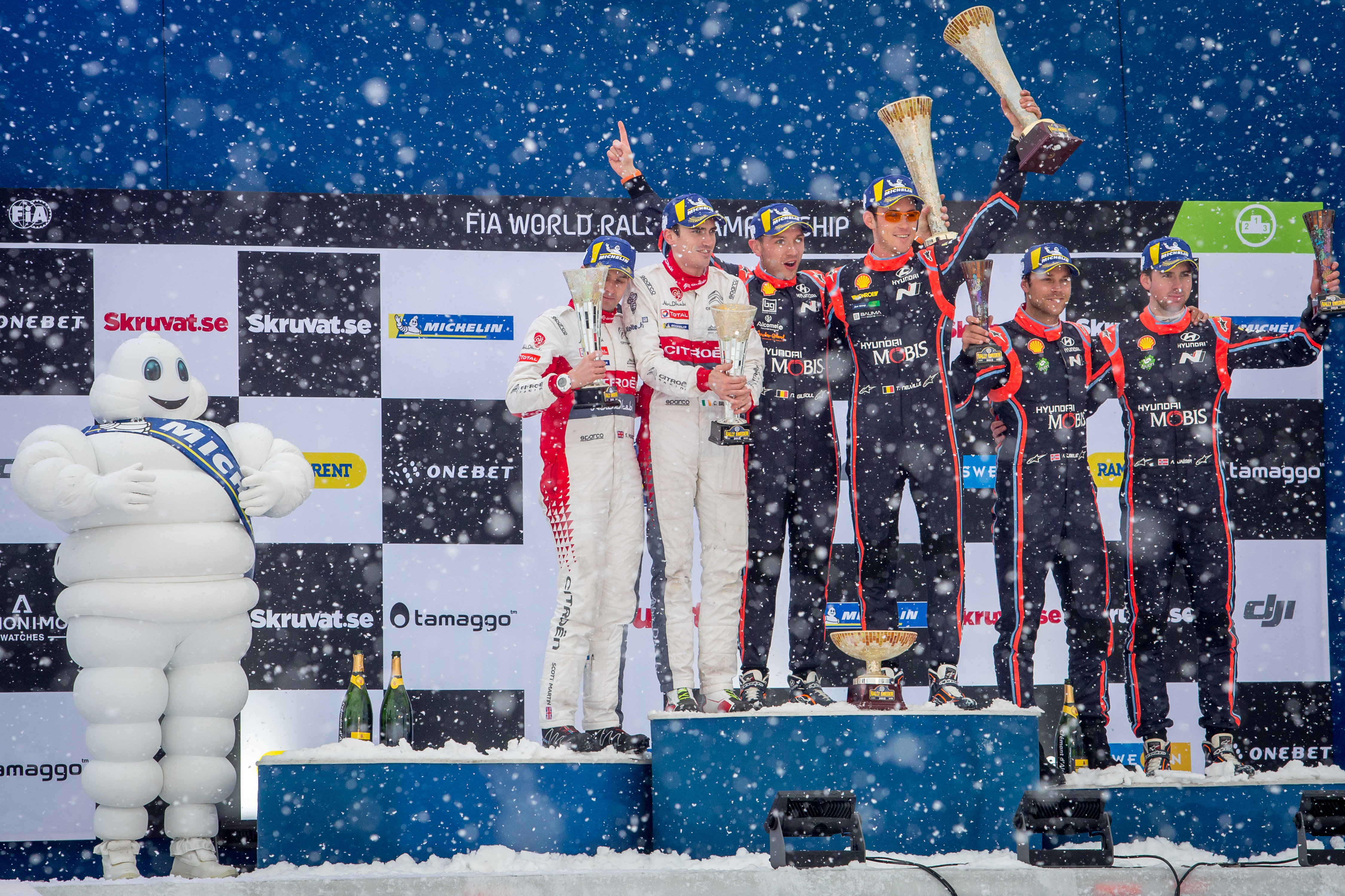 Podium Rajdu Szwecji 2018